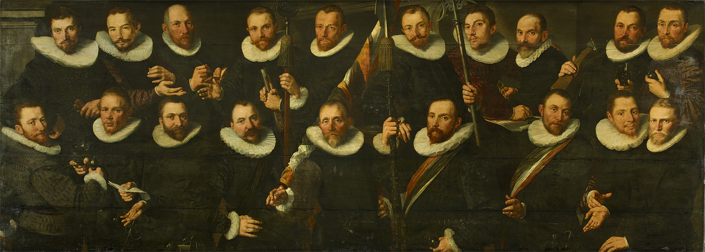 schilderij; Kloveniersdoelen; portret; groepsportret; schuttersstuk; Bisschop, Jan Philipsz. de; Vinck, Pieter Egbertsz.; Veer, Gerrit de; Claesz., Cornelis